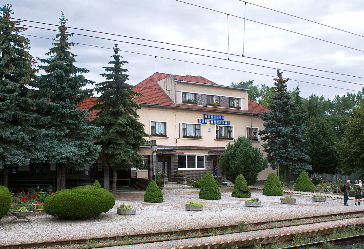 železniční stanice Bánovce nad Ondavou na východním Slovensku v okrese Michalovce